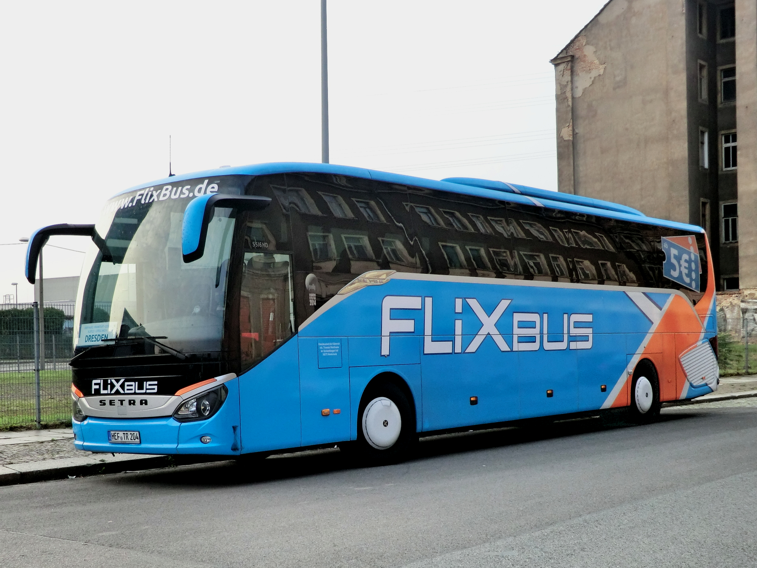 Flixbus Bus